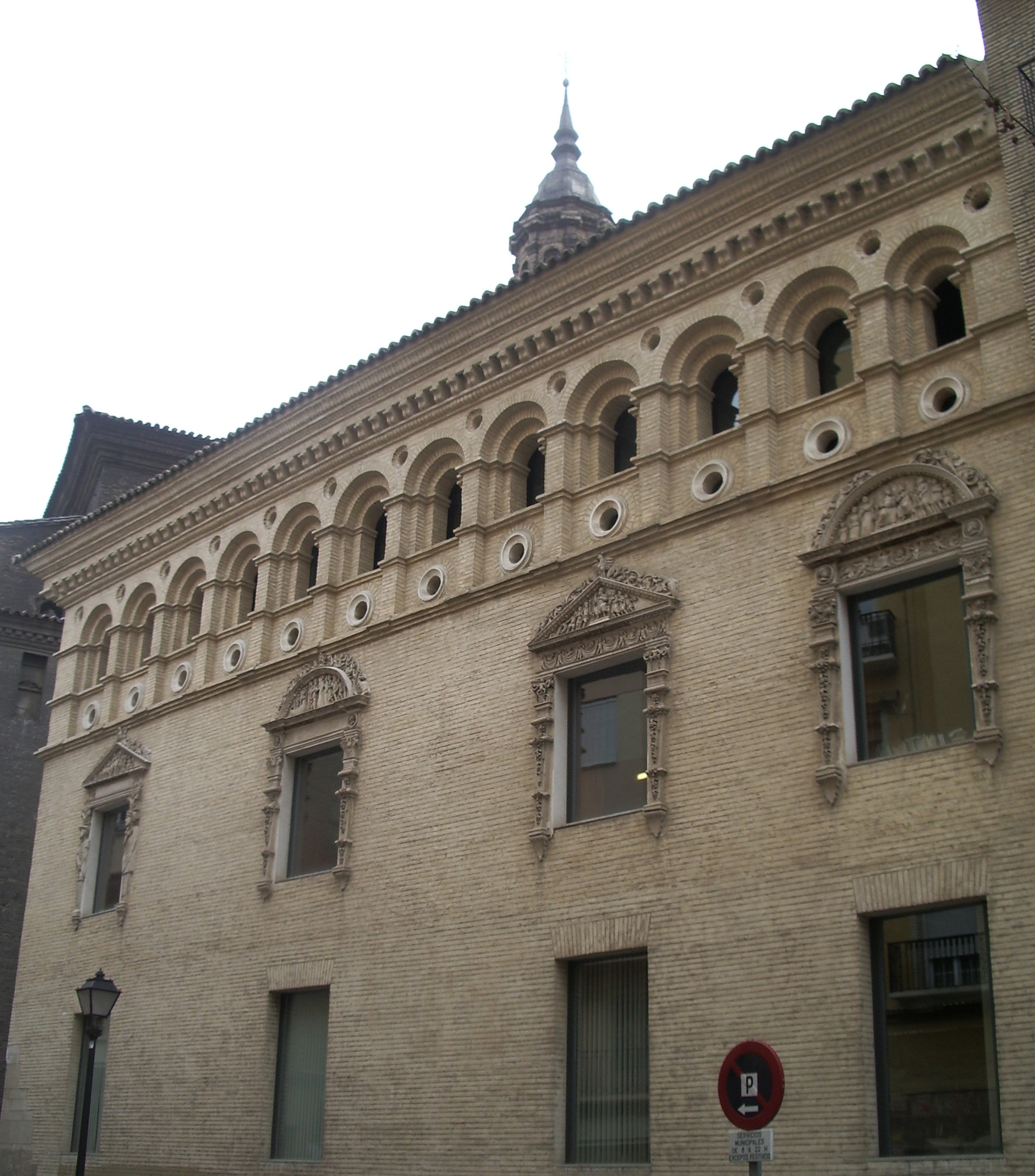 Casa de los Morlanes-Zaragoza